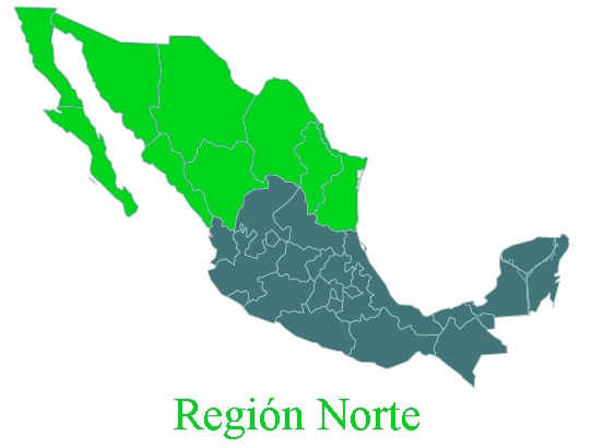 Mapa de la republica mexicana mostrando los estados de la zona norte.